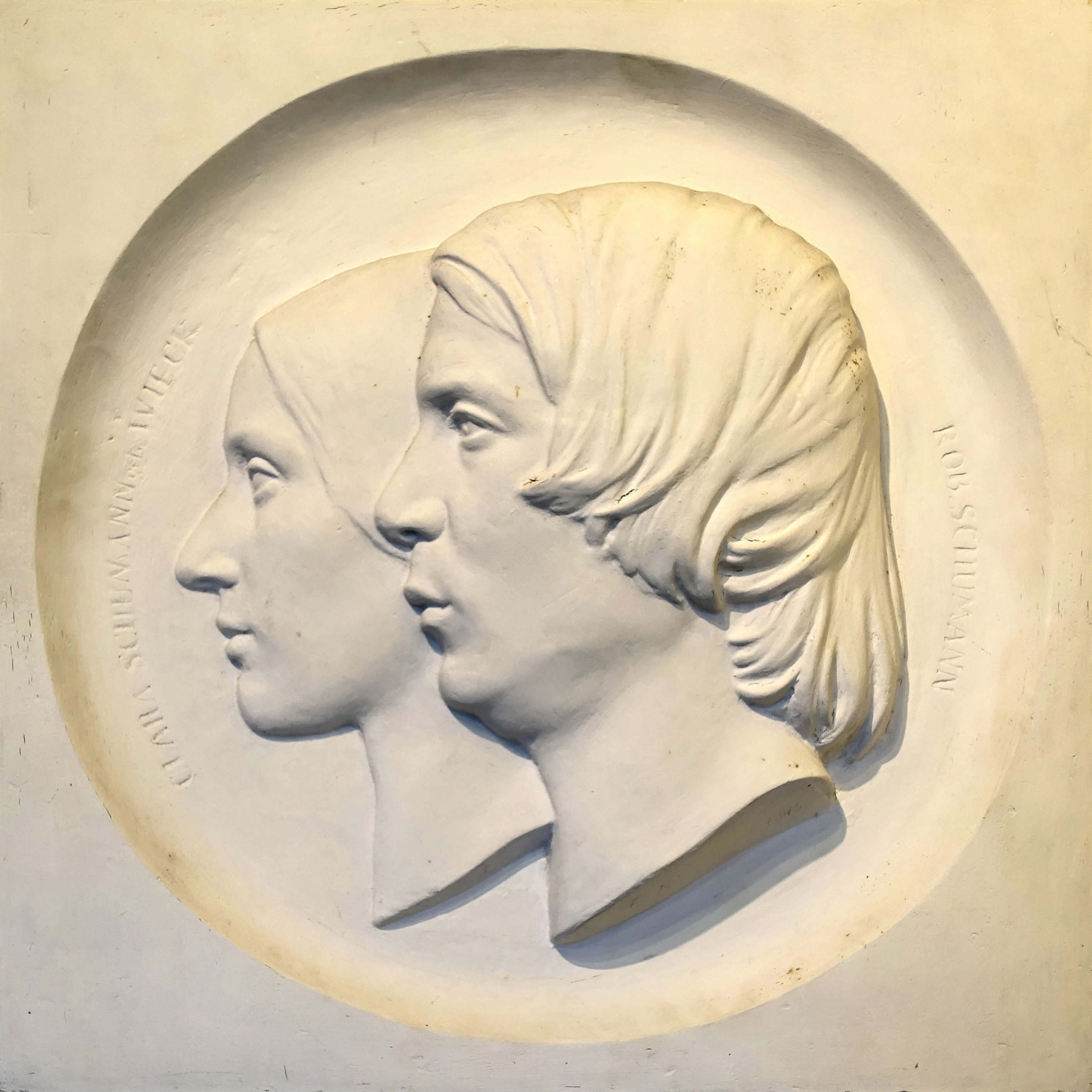 Die Gedächtniskirche Schönefeld in Schönefeld (Leipzig) 2020 - Relief für Clara Schumann geb. Wieck und Robert Schumann - es handelt sich vermutlich um eine Kopie des Originals von Ernst Rietschel (von 1846) - es befindet sich rechts vom Saal-Eingang